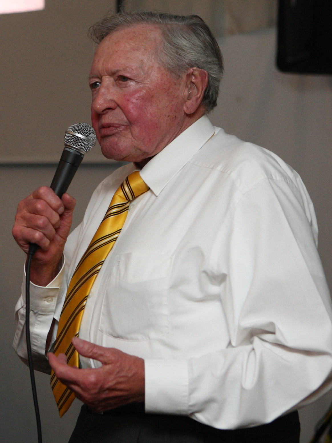 Otto Flimm in Ruppichteroth-Schönenberg während der Christophorus-Fahrt 2012